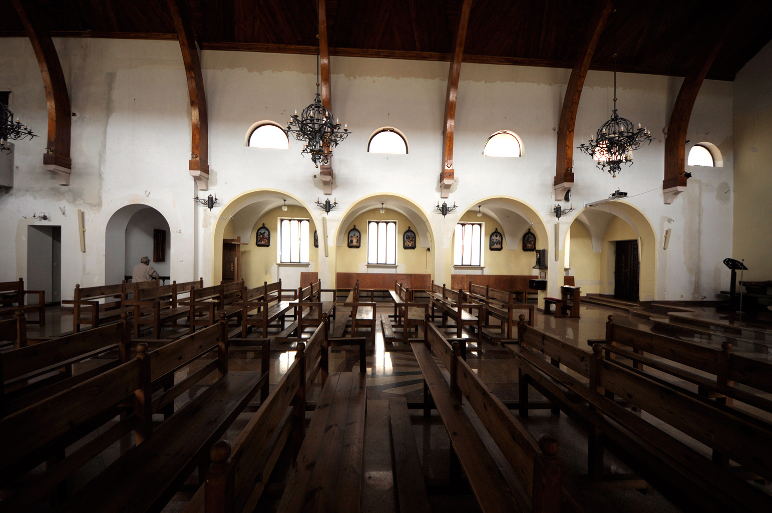 kościół par. p.w. Miłosierdzia Bożego i św. Faustyny, 1873, 1936-38 Warszawa, ul. Żytnia 1, Wola 08.2003.